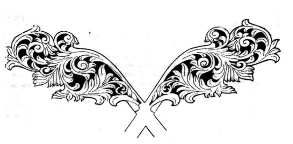 Selembayung